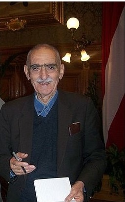 Iraj Afshar na Conferência de Estudos Iranianos em Viena, 2007